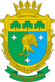 Герб Новотроїцького району